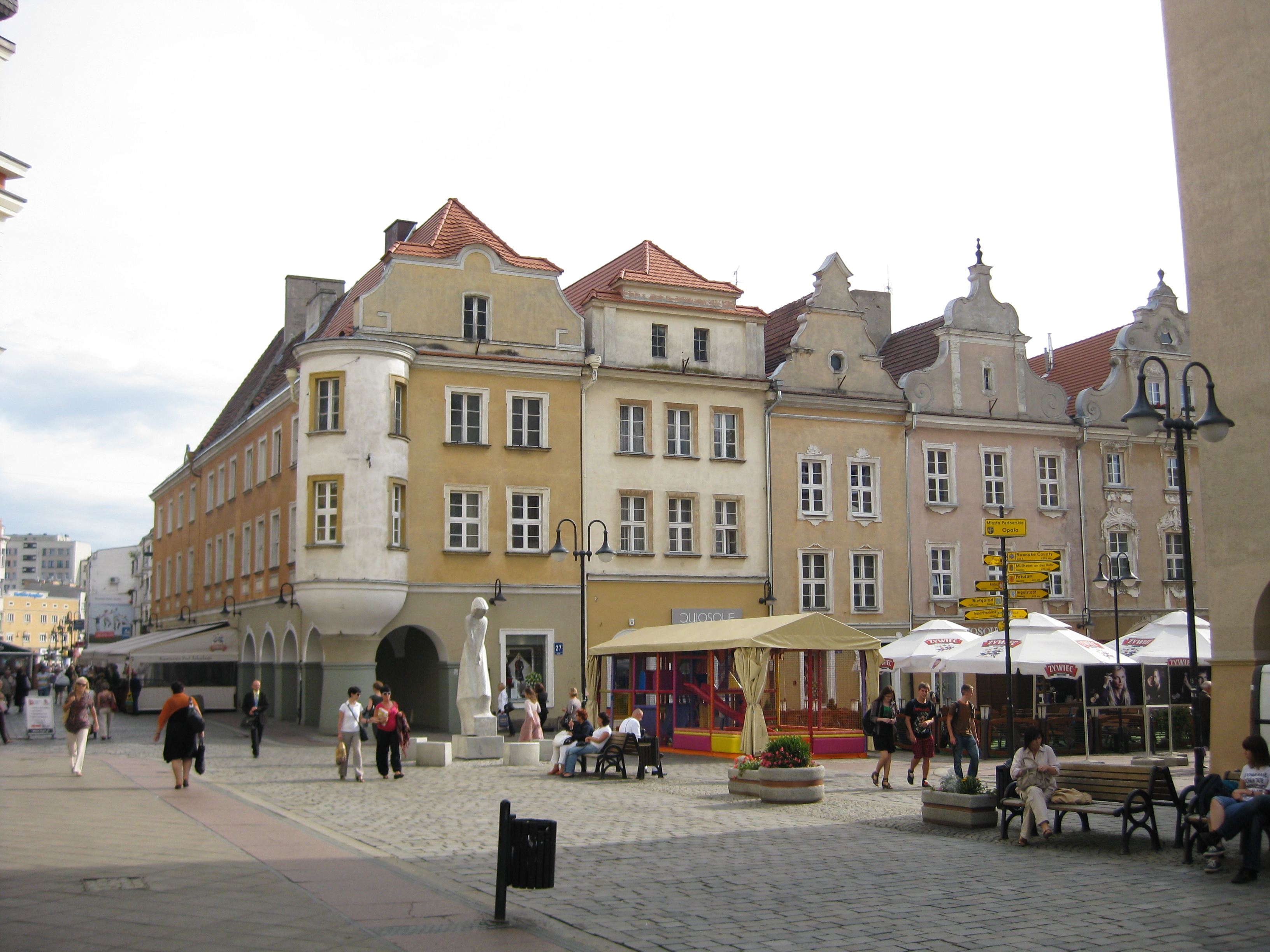 Ring Süden